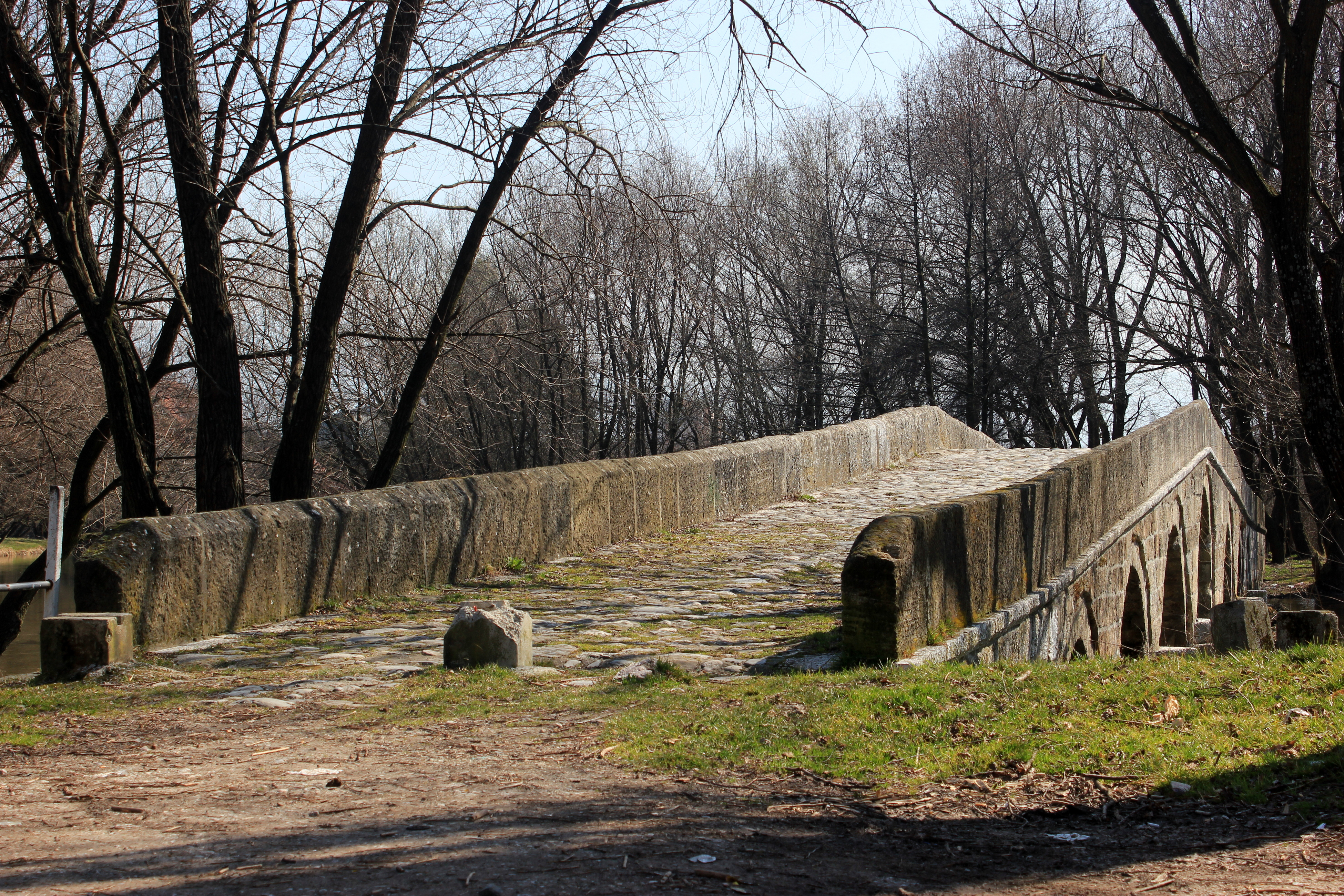 Die Steinbogenbrücke Rimski most über die Bosna bei Ilidža.